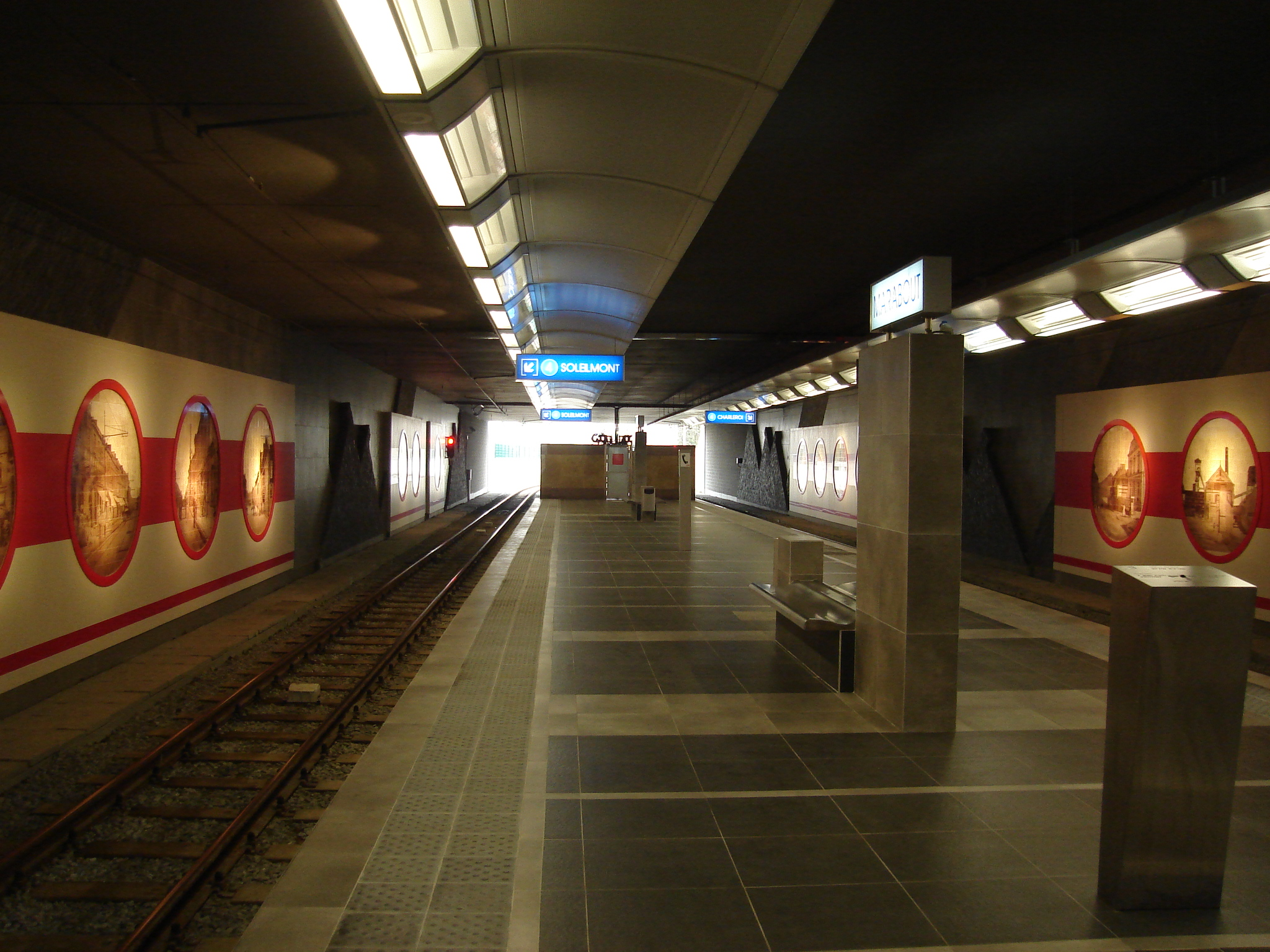 Quai de la station Marabout.